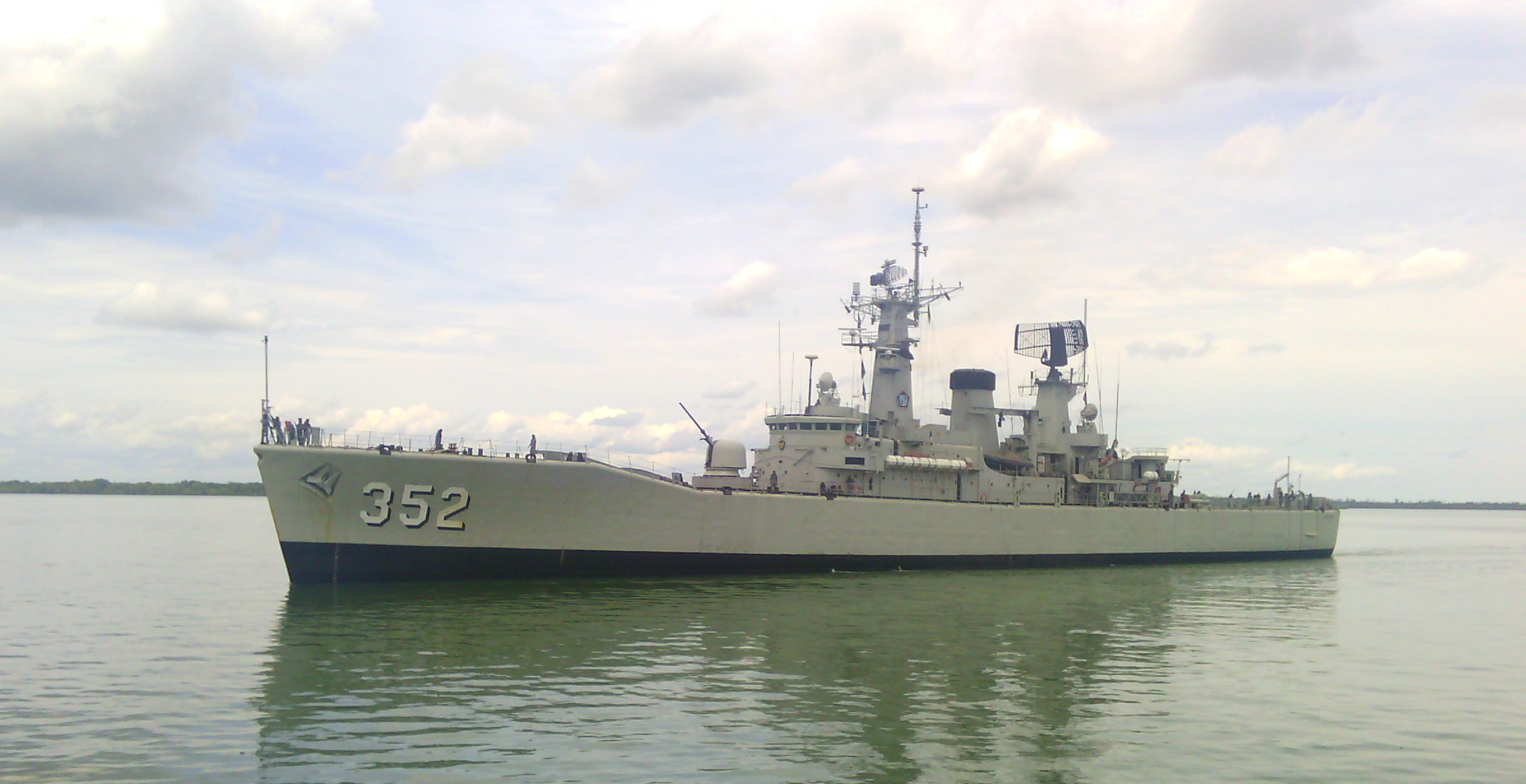 KRI " Slamet Riyadi" 352